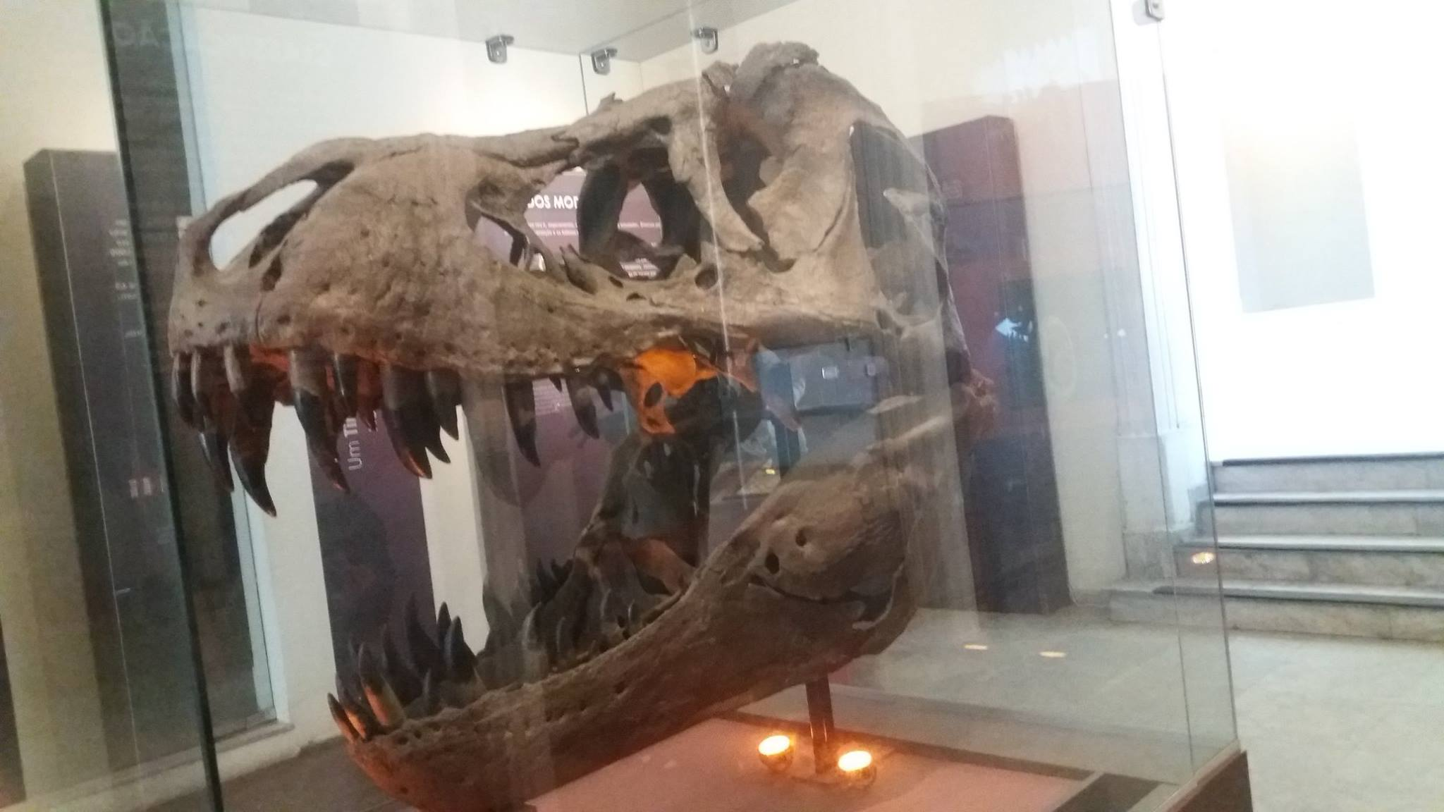 Museu Nacional, inclusive a Coleção Arqueológica Balbino de Freitas